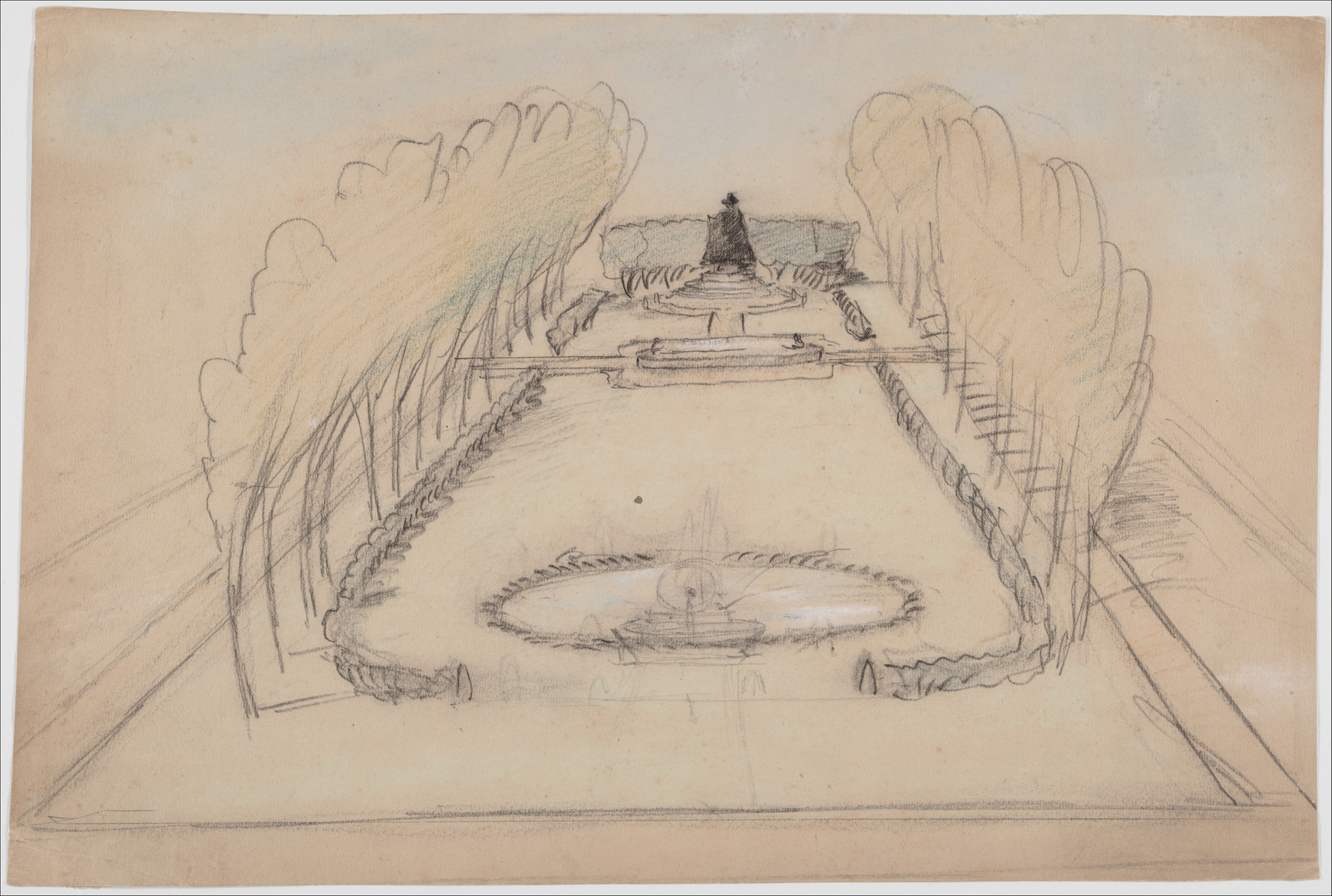 Drawing; Drawings